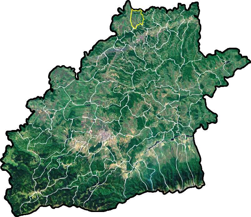 Blajel jud Sibiu.